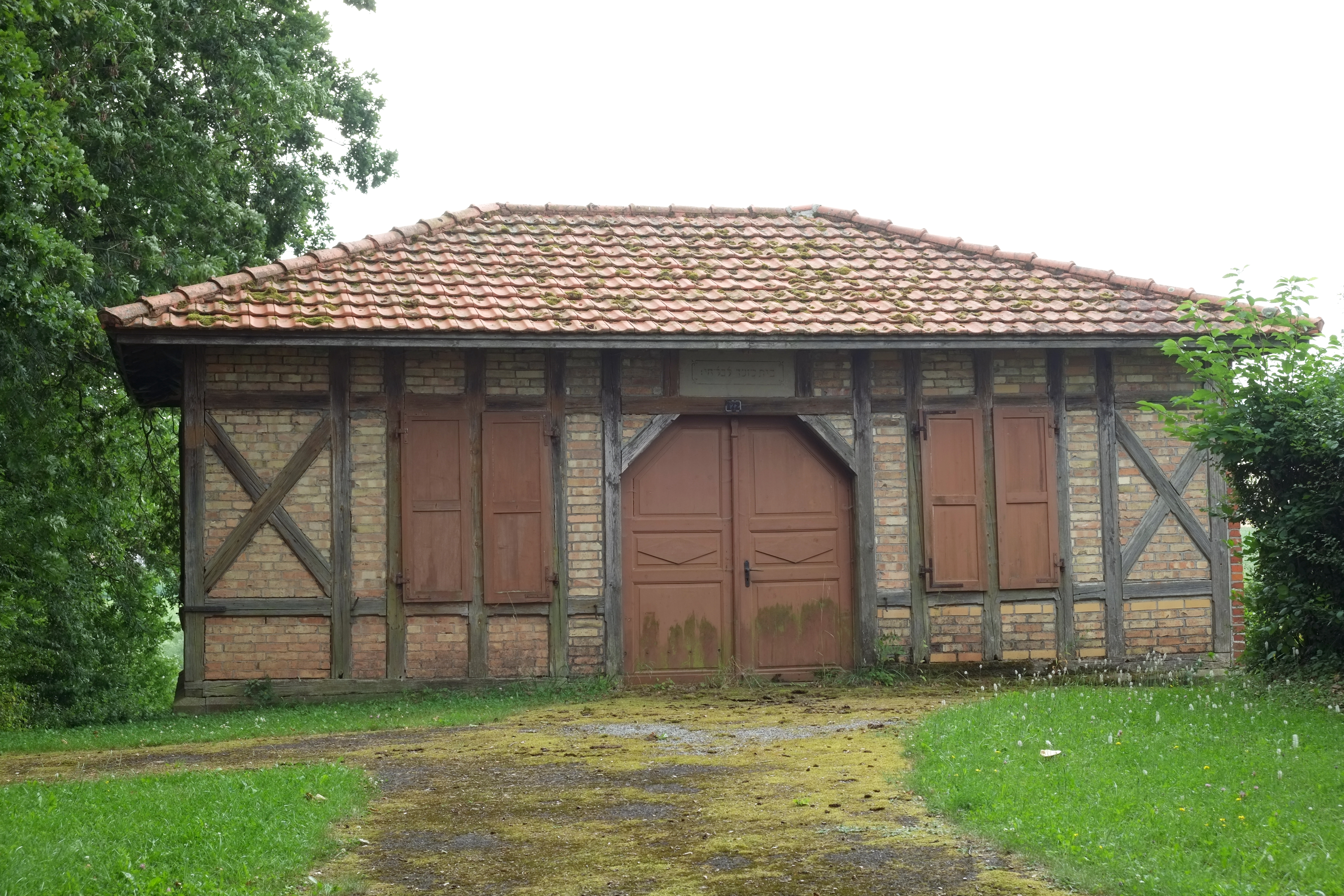 Jüdischer Friedhof in Bödigheim, einem Stadtteil von Buchen im Neckar-Odenwald-Kreis (Baden-Württemberg, Deutschland)